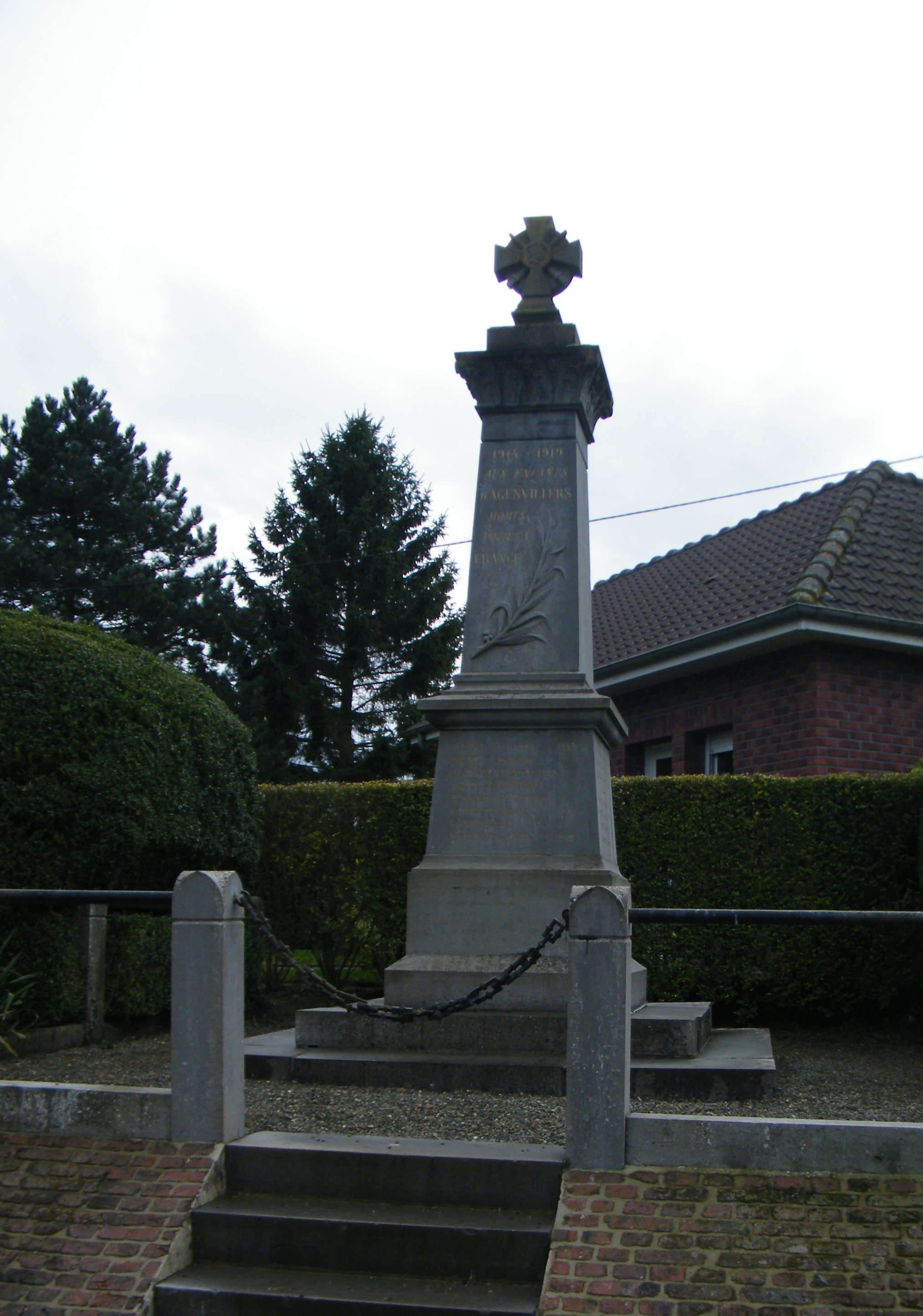 Le monument aux morts pour la patrie.